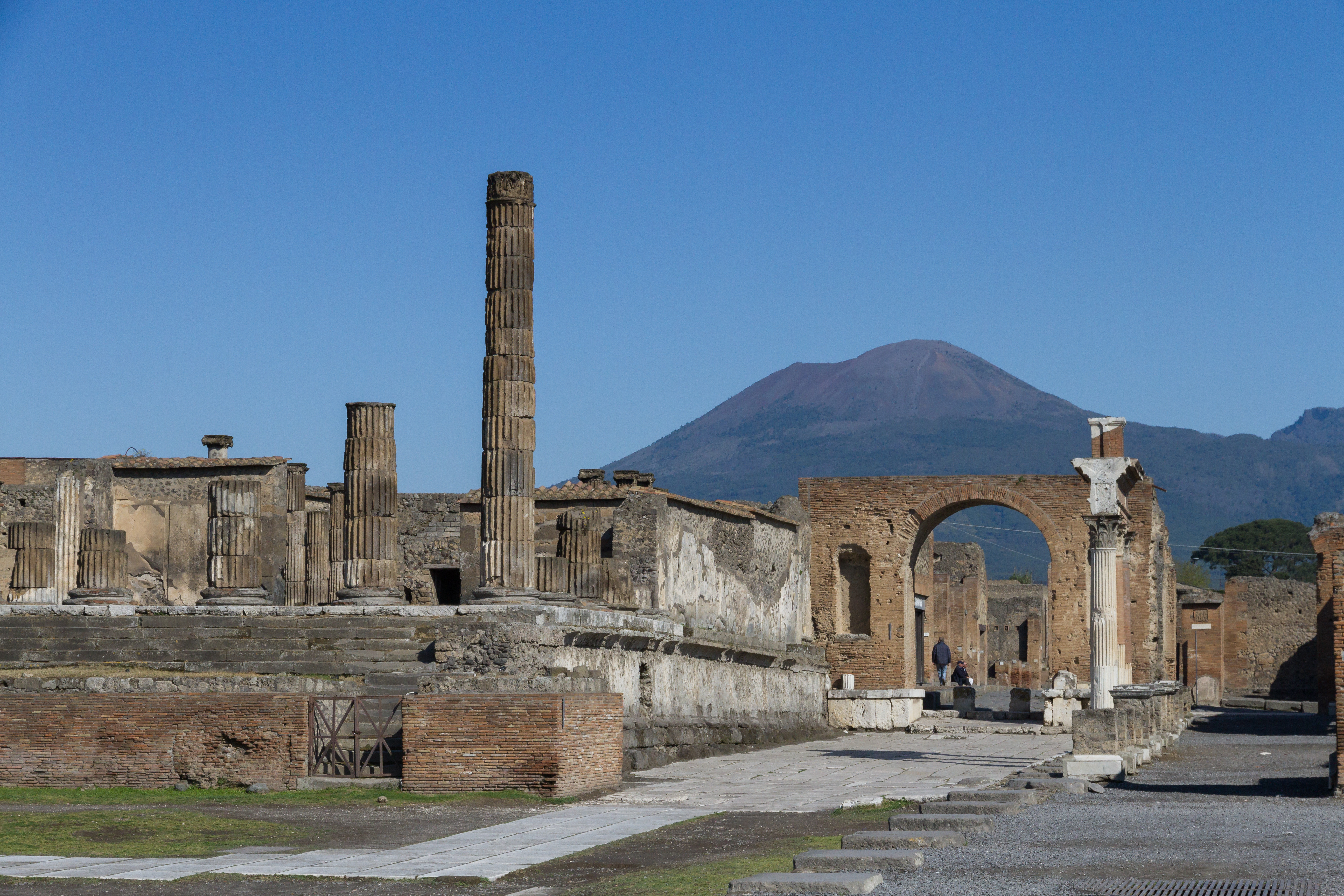 Pompeji_Forum